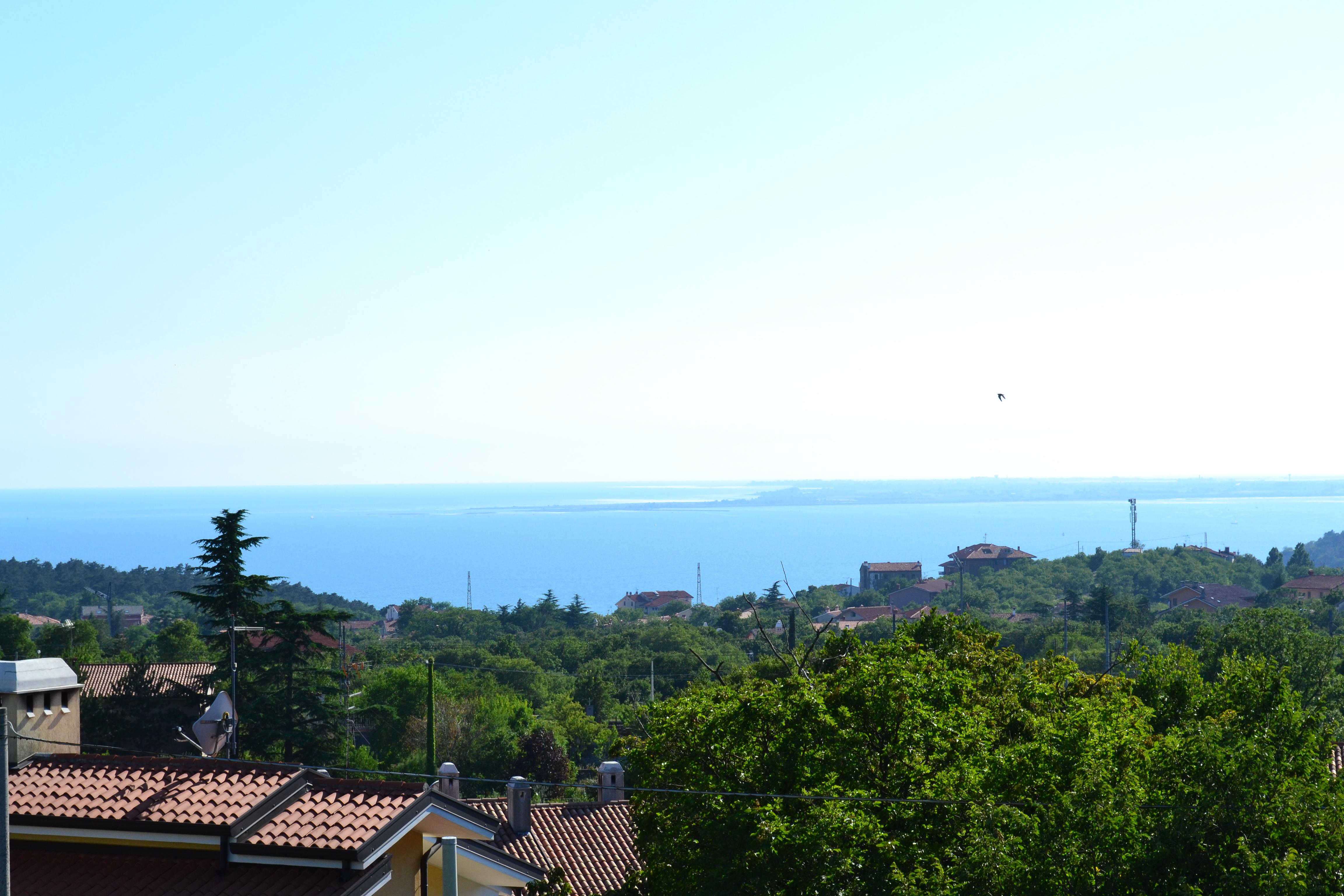 Pogled z Vižovelj proti morju.